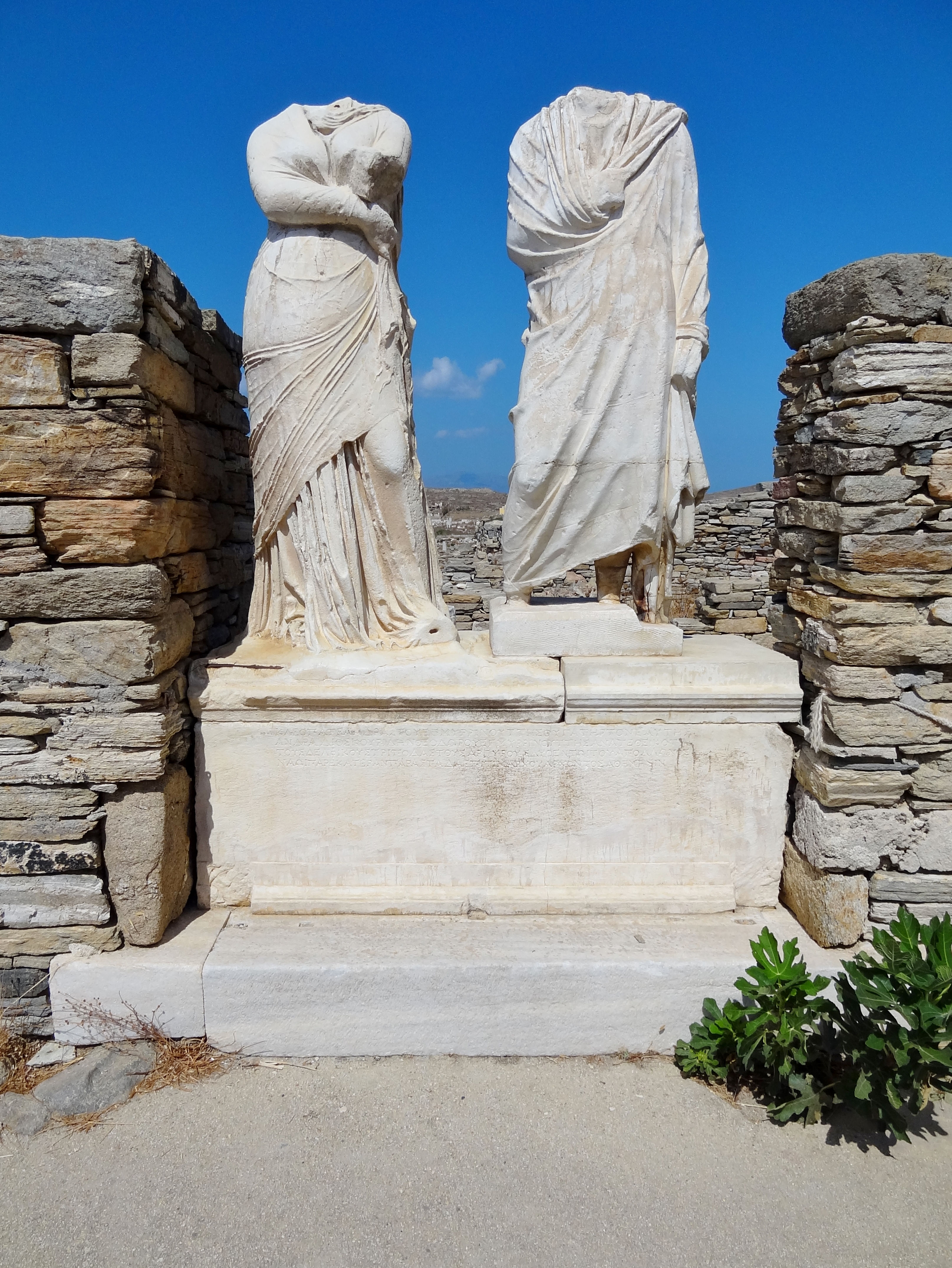 Statuen eines Ehepaars, der Athenerin Kleopatra und ihres Gatten Dioskurides (138/137 v. Chr.), im Haus der Kleopatra im Theaterviertel auf Delos, Kykladen, Griechenland